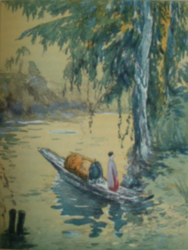 Illustration de Thi-Bâ par Jean d'Esme Société des médecins bibliophiles, 1924 Résolution très basse de l'image Pas de copyright Copyright Renewal Database